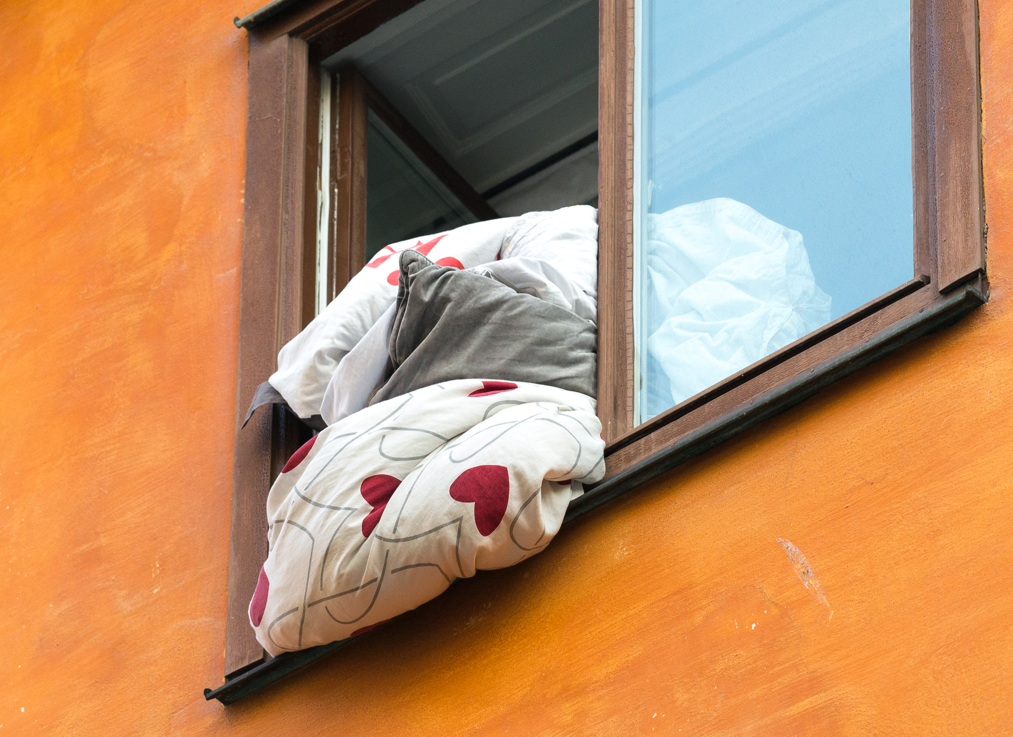 Vädring av sängkläder i byggnad i Stockholm år 2018.